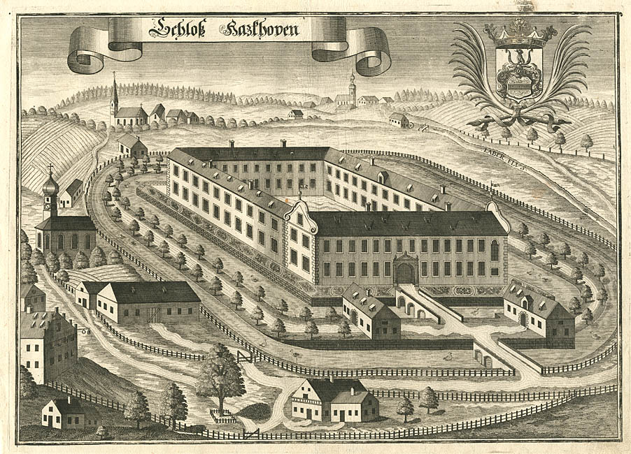 “Schloß Hatzkoven” (Niederhatzkofen bei Rottenburg a. d. Laaber), aus: aus : Beschreibung des Churfürsten- u. Hertzogthumbs Ober- und Nidern Bayrn. Rentamt Landshut, 1723